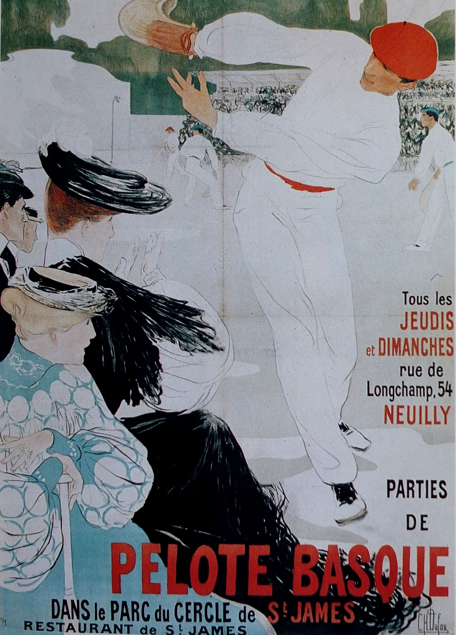 Affiche pour le club de Pelote basque de Neuilly par Clémentine-Hélène Dufau (1911). Conservé au Musée de la Publicité (Paris). Reproduit dans De lumière et d'ombre: Clémentine-Hélène Dufau (Quinsac, 1869- Paris, 1937), de Mayi Milhou, éditions Art & Arts, 1997 - (ISBN : 2-911059-03-4) - Photo de cette reproduction par Siren-Com